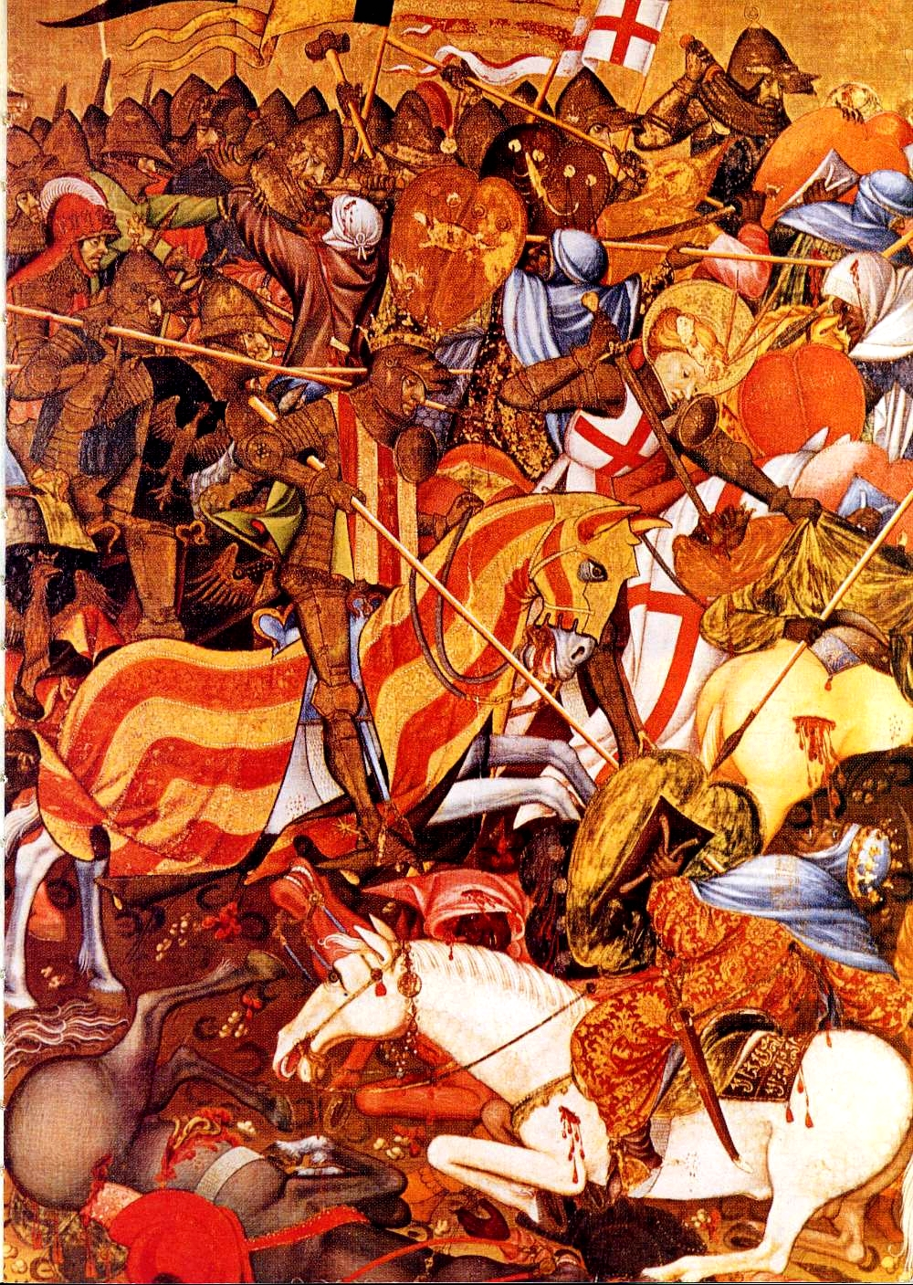 Batalla del Puig. Temple sobre tabla. Victoria and Albert Museum. Londres. Representa la batalla en la que el Rey de Aragón (vestido con el Señal Real de Aragón), Jaime I, conquista El Puig a las tropas musulmanas con la intercesión de San Jorge (vestido con la Cruz de San Jorge), que aparece en segundo plano.